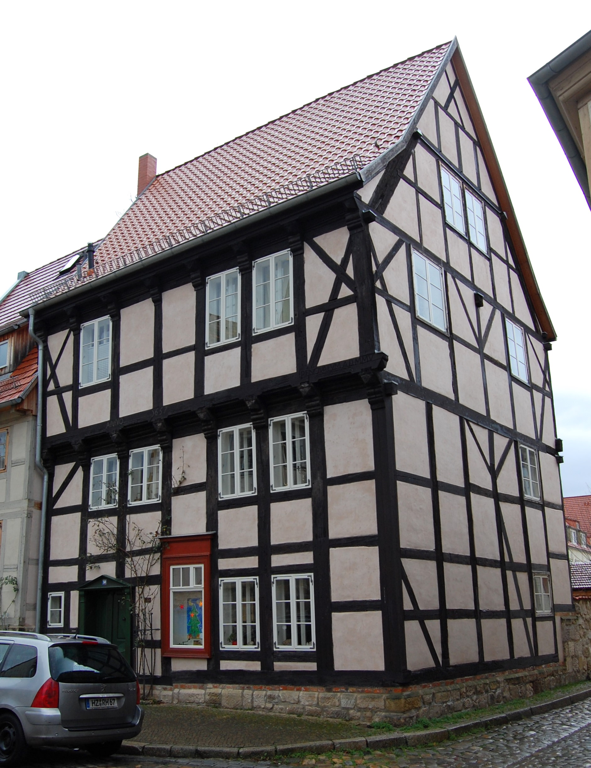 Haus Schmale Straße 50 in Quedlinburg, Ecke Kleine Gasse